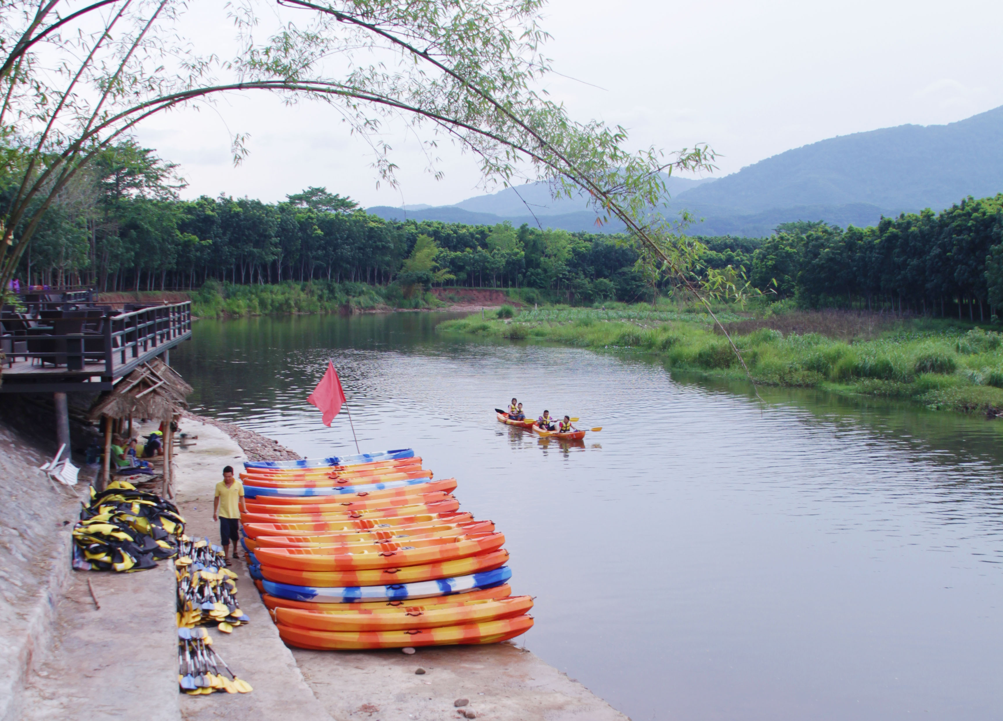 云南省勐腊县南腊河野趣营地的南腊河上的漂流活动。